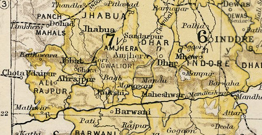 Kartenausschnitt Alirajpur